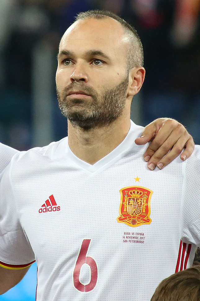 Сборная России сыграла вничью с Испанией, уступая со счётом 0:2